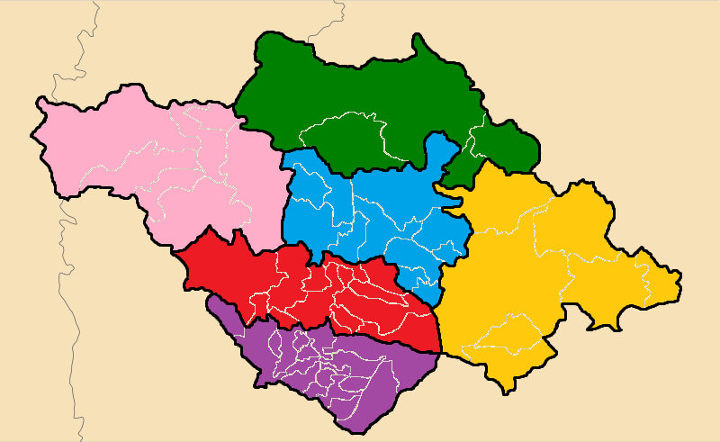 español (es): Regiones de Tlaxcala Norte Oriente Poniente Centronorte Centrosur Sur